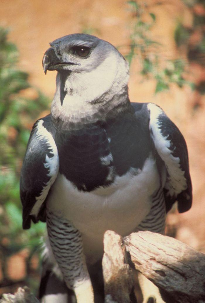 Harpy Eagle